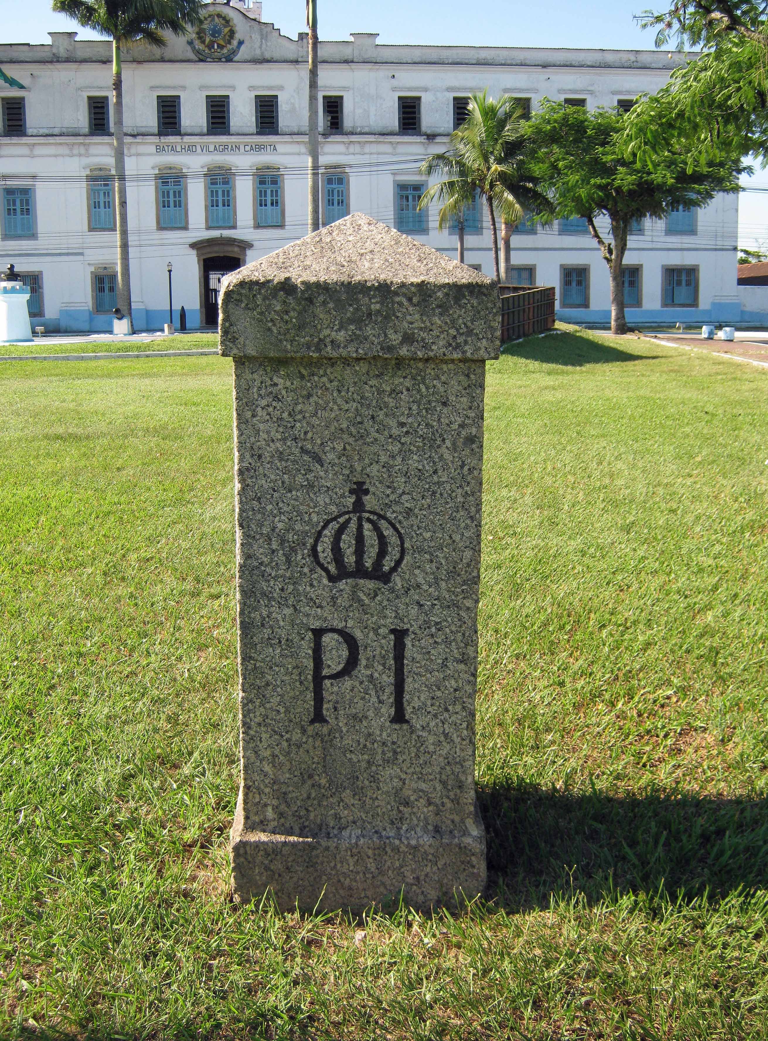 D. Pedro, Imperador e reformador, tomou a si a direção da fazenda de Santa Cruz e aumentou-lhe a renda com novas aquisições de terras; aí estabeleceu um haras, prado fechado para criação de cavalos. Monarca filantropo, procurou ao mesmo tempo cercar essa solidão real de uma população dedicada e reconhecida. (Jean-Baptiste Debret)